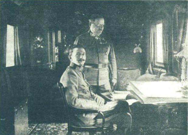 Cesar Karel in načelnik generalnega štaba Arthur Arz von Straussenburg pri delu v dvornem vl